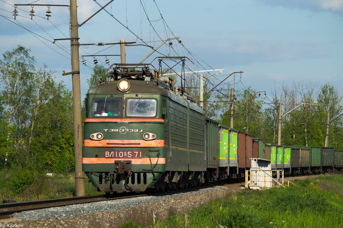 С завода поступил в депо Иркутск-Сорт. (09.1979 г.) 1996 — передан в депо СПб.-Финлянский. 2000 — передан в депо Волховстрой. 05.2003 — временно передавался на Куйбышевскую ж. д. 07.2003 — возвращен в депо Волховстрой. КР-1 Челябинский ЭРЗ 02.1985 г. КР-1 Челябинский ЭРЗ 04.1990 г. КР-1 Челябинский ЭРЗ 03.1999 г. КР Челябинский ЭРЗ 04.2003 г.